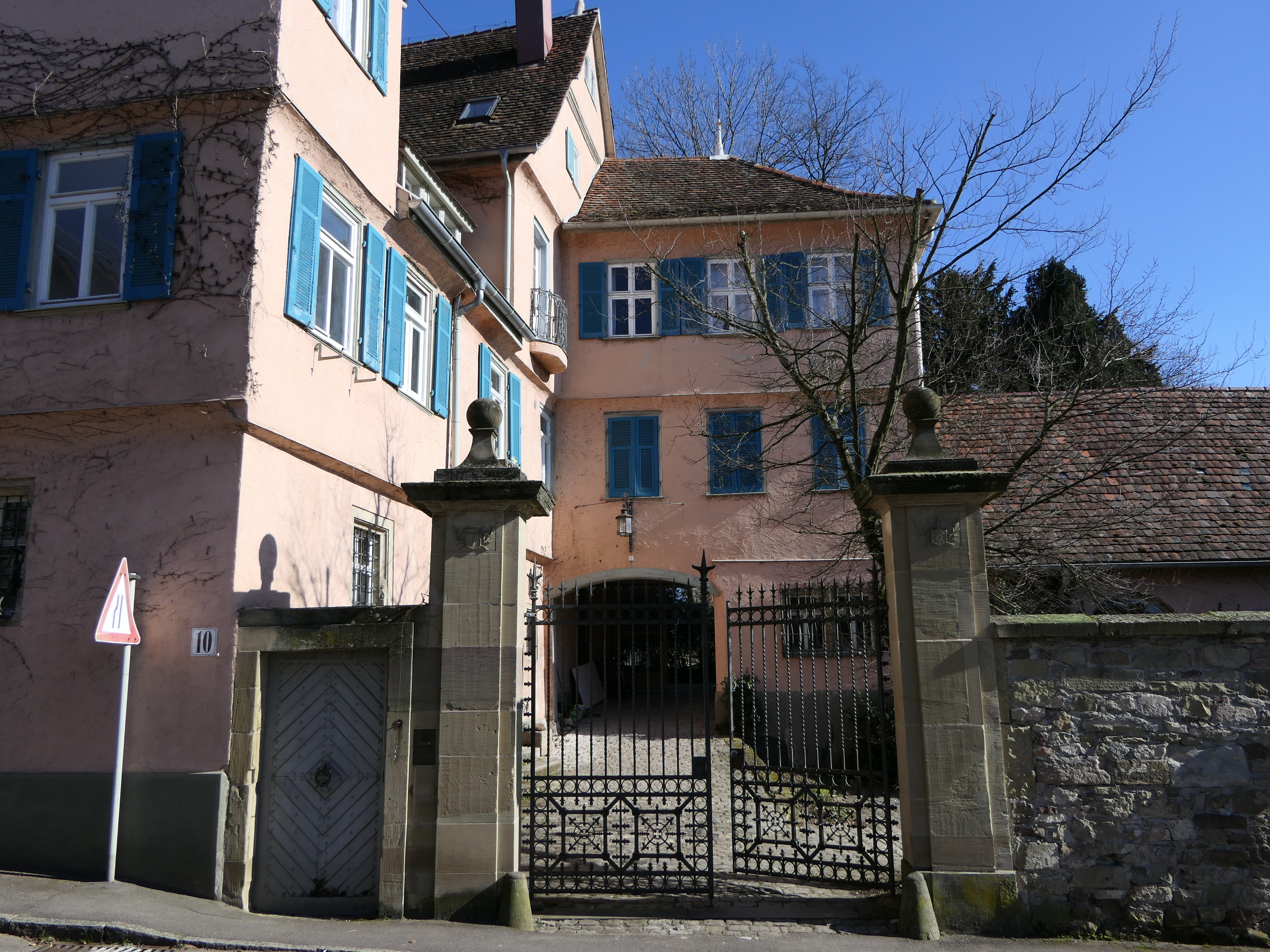 Das Schloss Grossheppach im gleichnamigen Teilort der Stadt Weinstadt im Rems-Murr-Kreis. Torhäuser und Hauptportal.